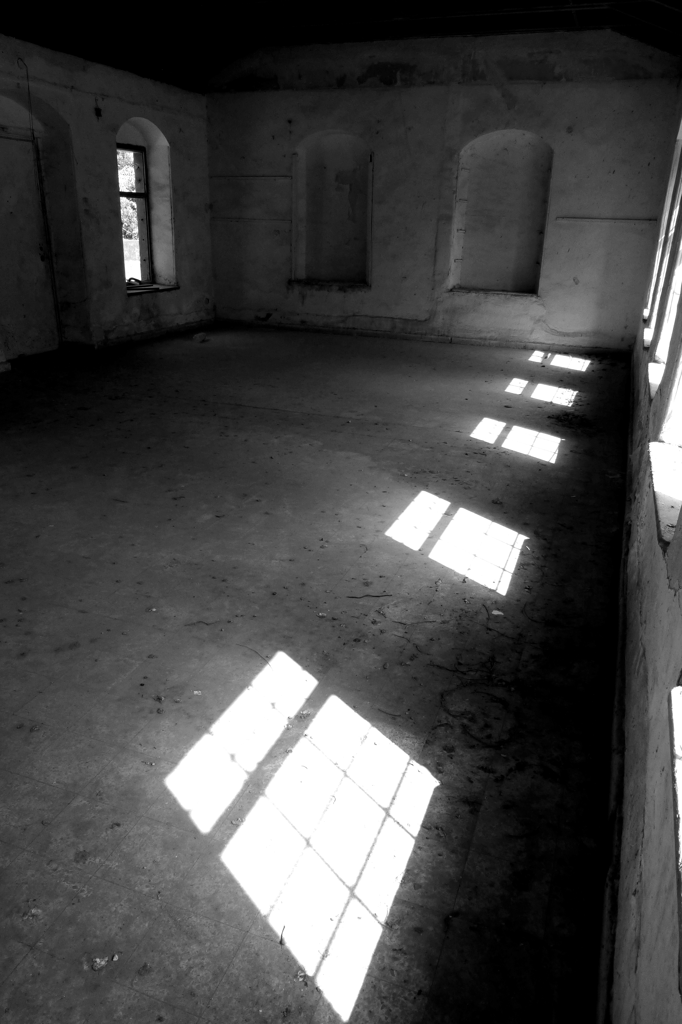 ביתם של מינה בנימין פוקס, מהבתים הראשונים במושבה. מבנה בן קומה שנבנה ב-1888 מאבני כורכר. ב-1970 עבר המבנה לידי "בני ברית" ושימש כמועדון לנוער וקשישים. מ-2004 עומד נטוש ומיועד לשימור כחלק ממתחם המוזיאון לתולדות גדרה.